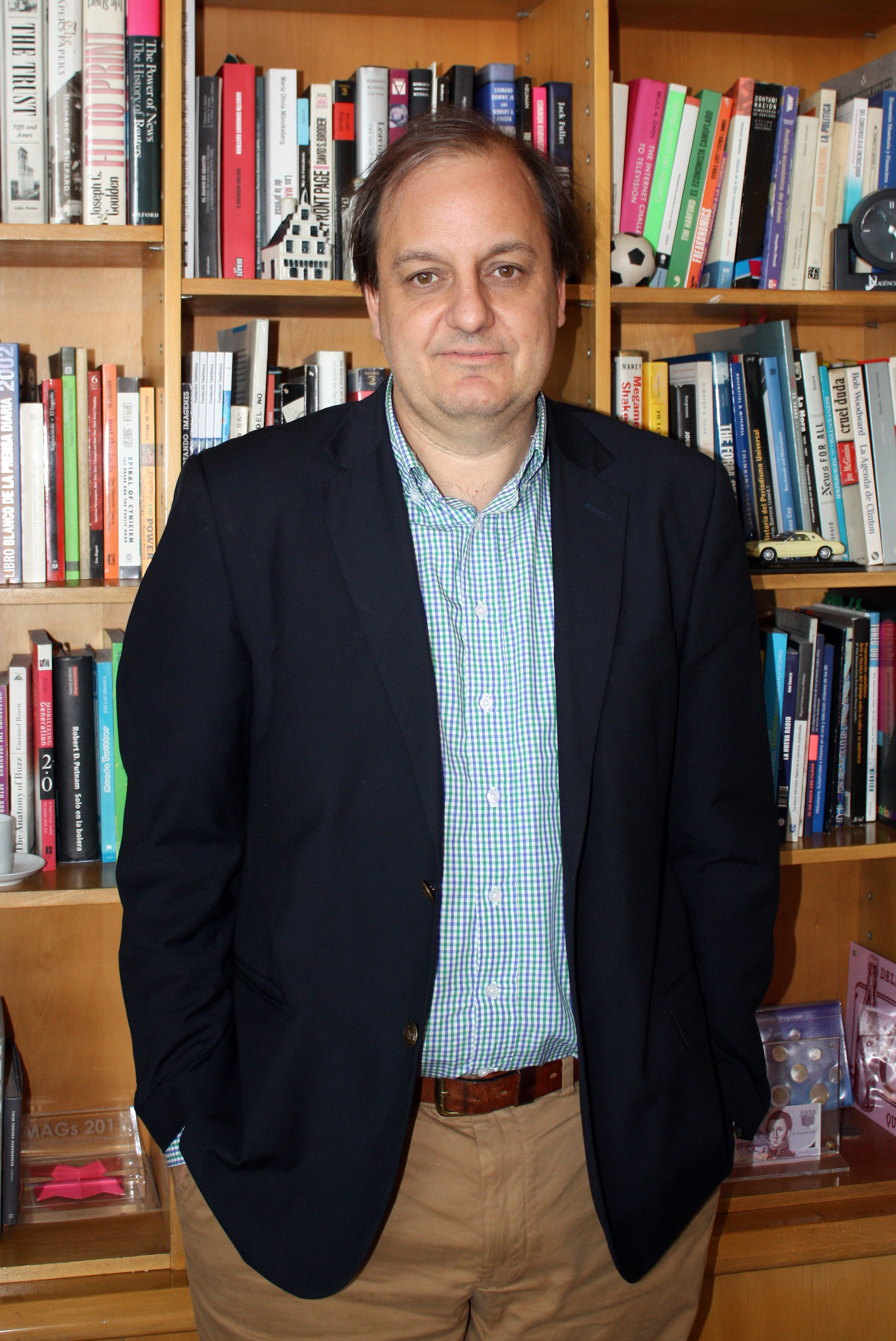 Decano de la Facultad de Comunicaciones de la Pontificia Universidad Católica de Chile